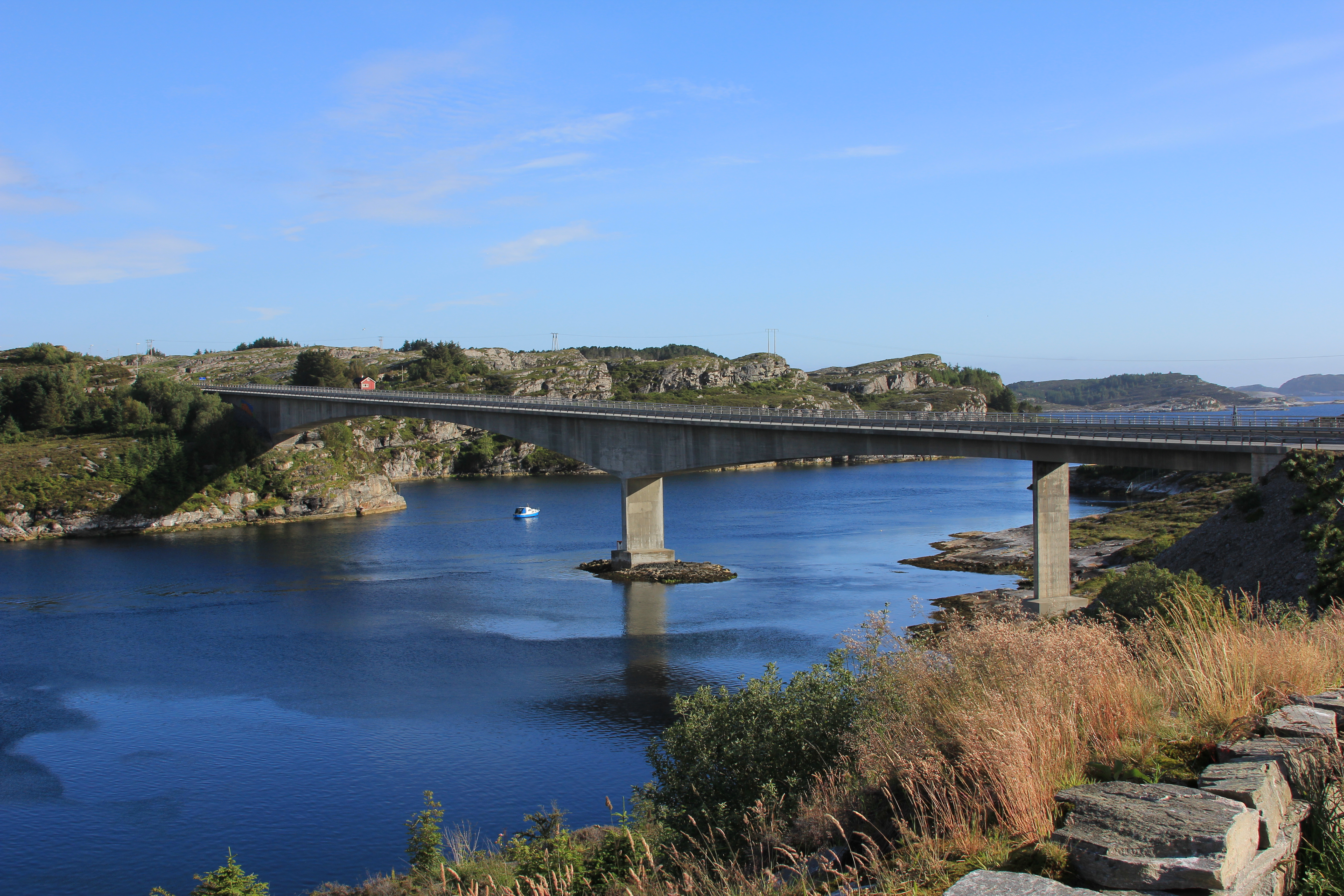 Svelgen bru (bridge) in Øygarden and Fjell, Norway